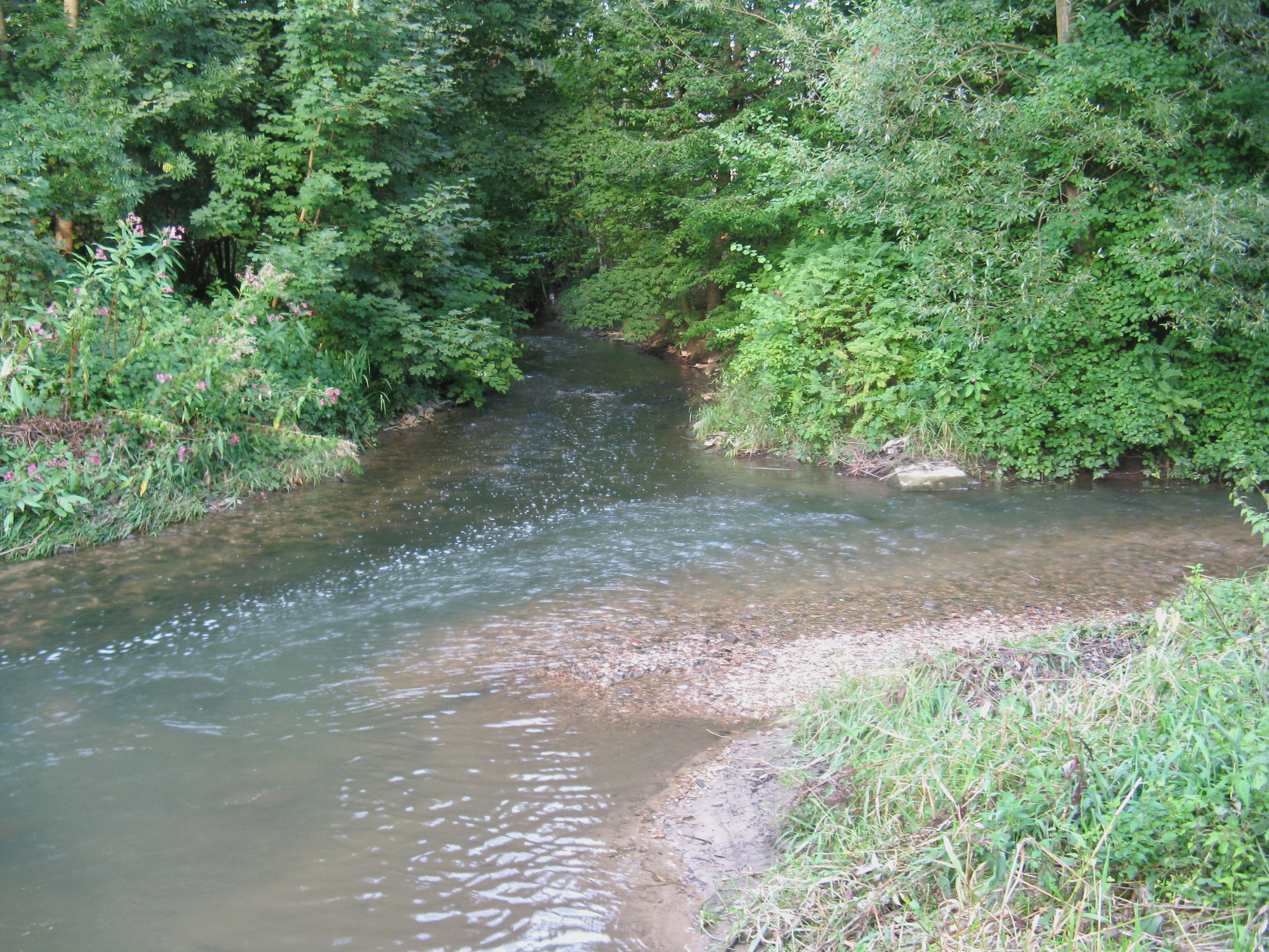 Mündung des Knochenbachs in die Werre bei Detmold